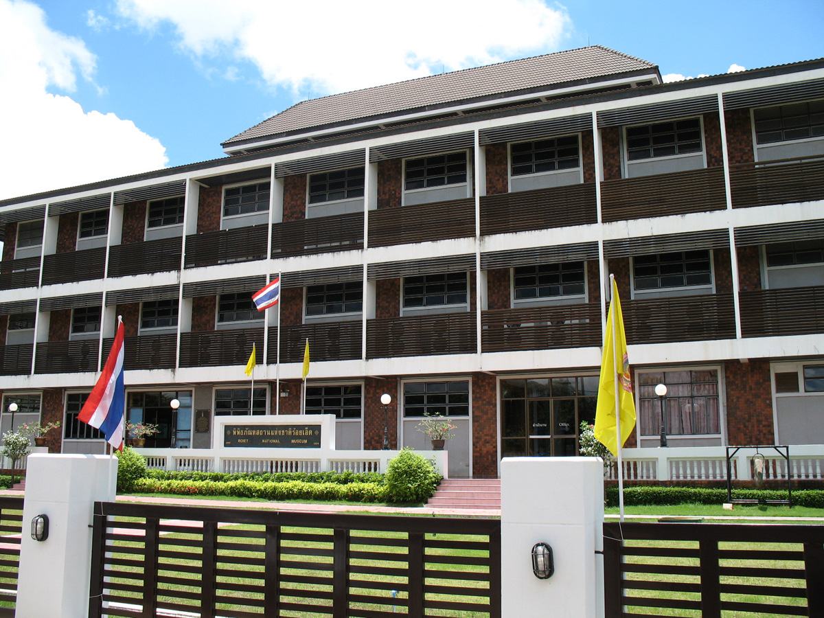 Roi Et National Museum, Roi Et Province.